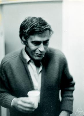 Foto di Shaul Foguel